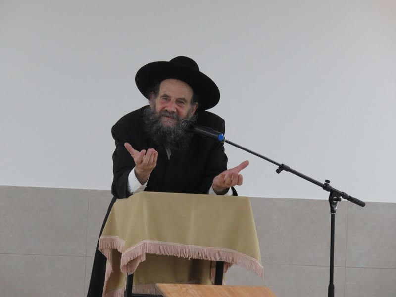 תמונת הרב חזקיהו יוסף מישקובסקי.